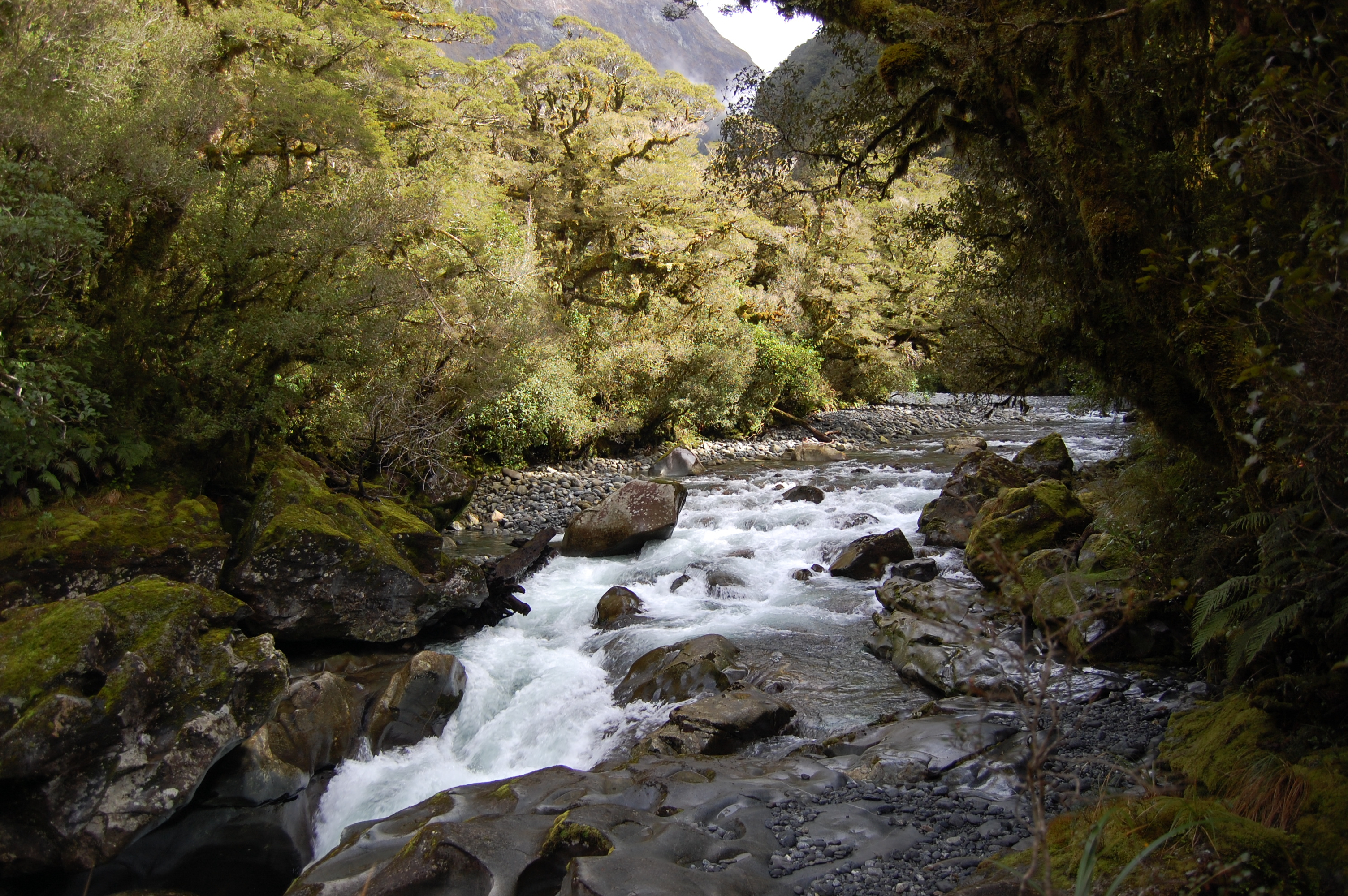 Aragonés: The Chasm (Fiordland, Nueva Zelanda)